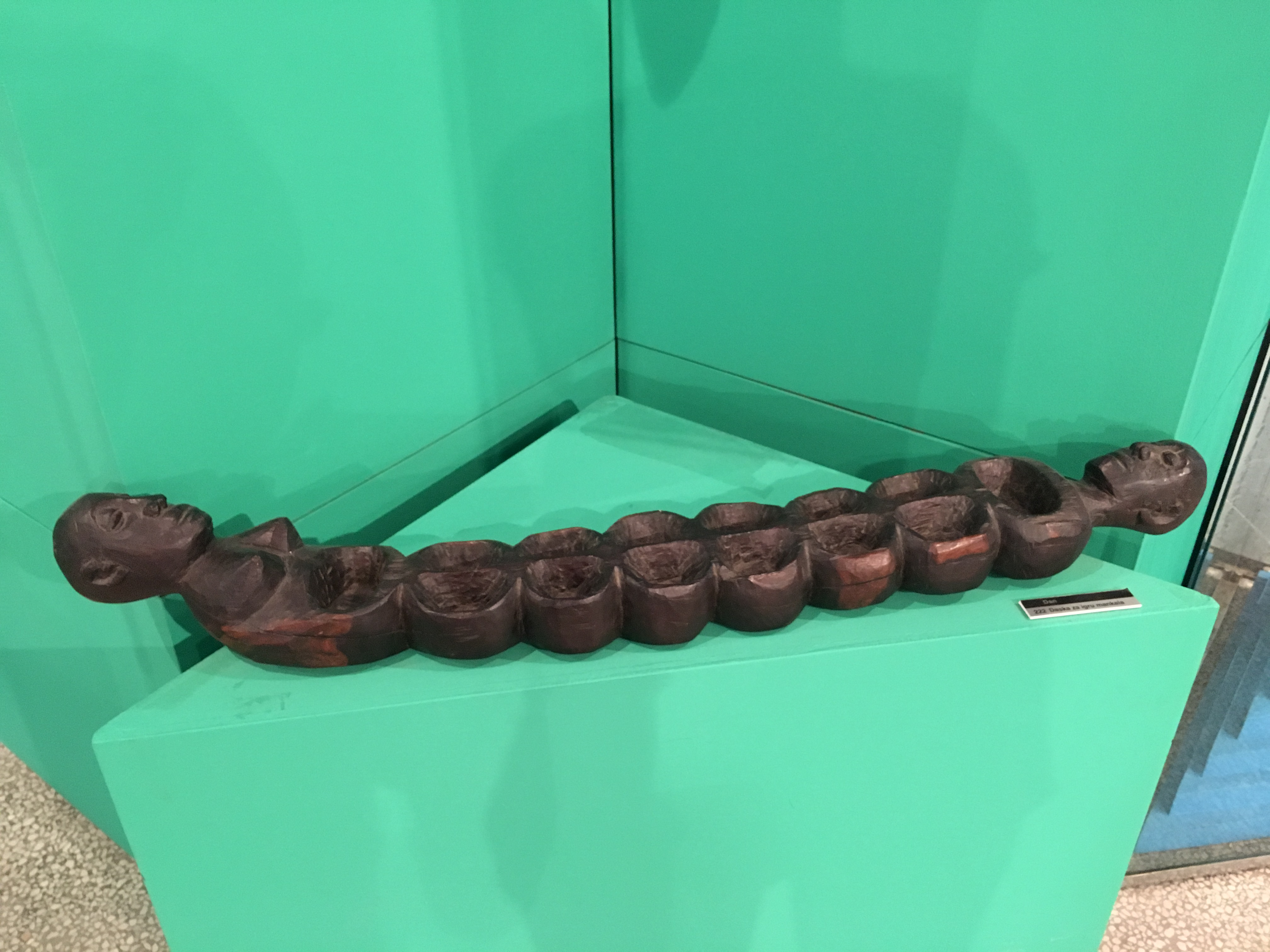 Srpski (latinica): Mankala je zajednički naziv za igre na tabli koja se igra u dvoje uglavnom u afričkim državama. Eksponat je fotogarfisan u Muzeju afričke umetnosti u Beogradu.